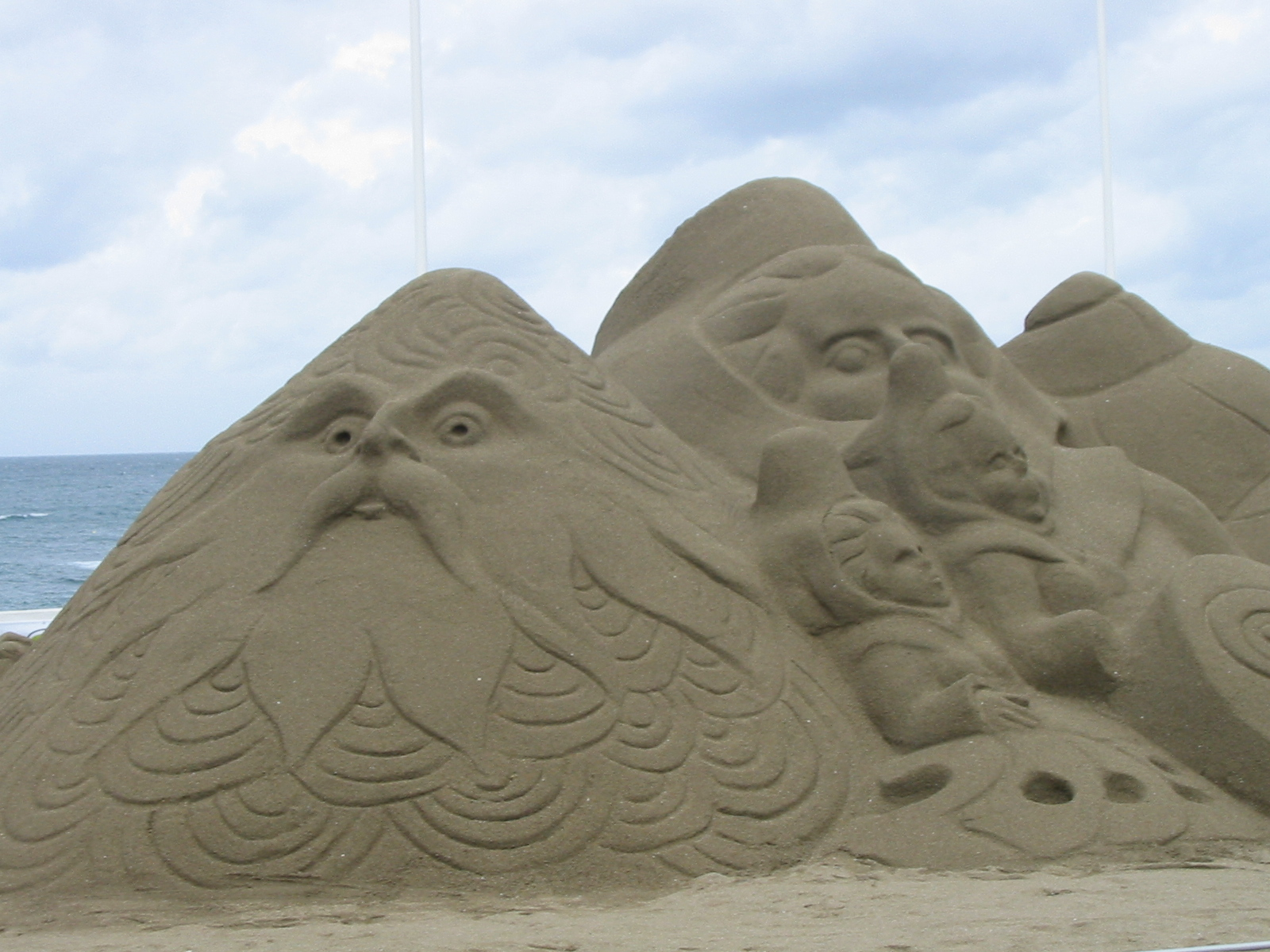 L'ensemble représente des personnages, un dauphin, une sirène, un coquillage géant, deux inscriptions. Un club de jeunes entretiennent l'œuvre (dégradations résultant du soleil et de la pluie) créée, à Saint-Quay-Portrieux et ailleurs en Bretagne, par une équipe d'artistes itinérants.